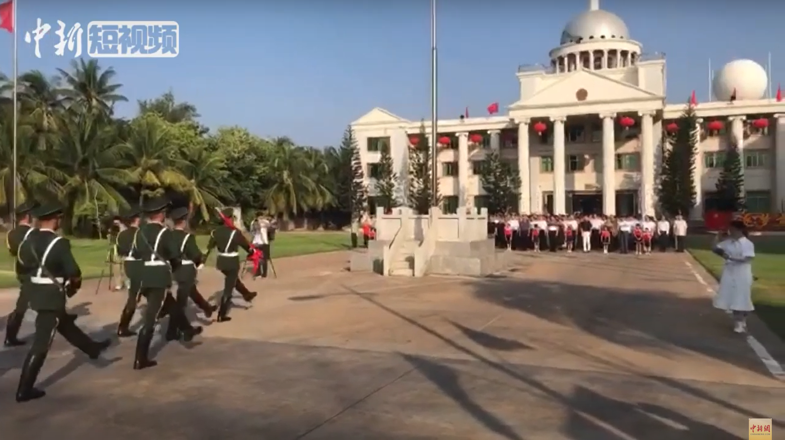 中文（中国大陆）: 2019年10月1日，三沙市举行升旗仪式。